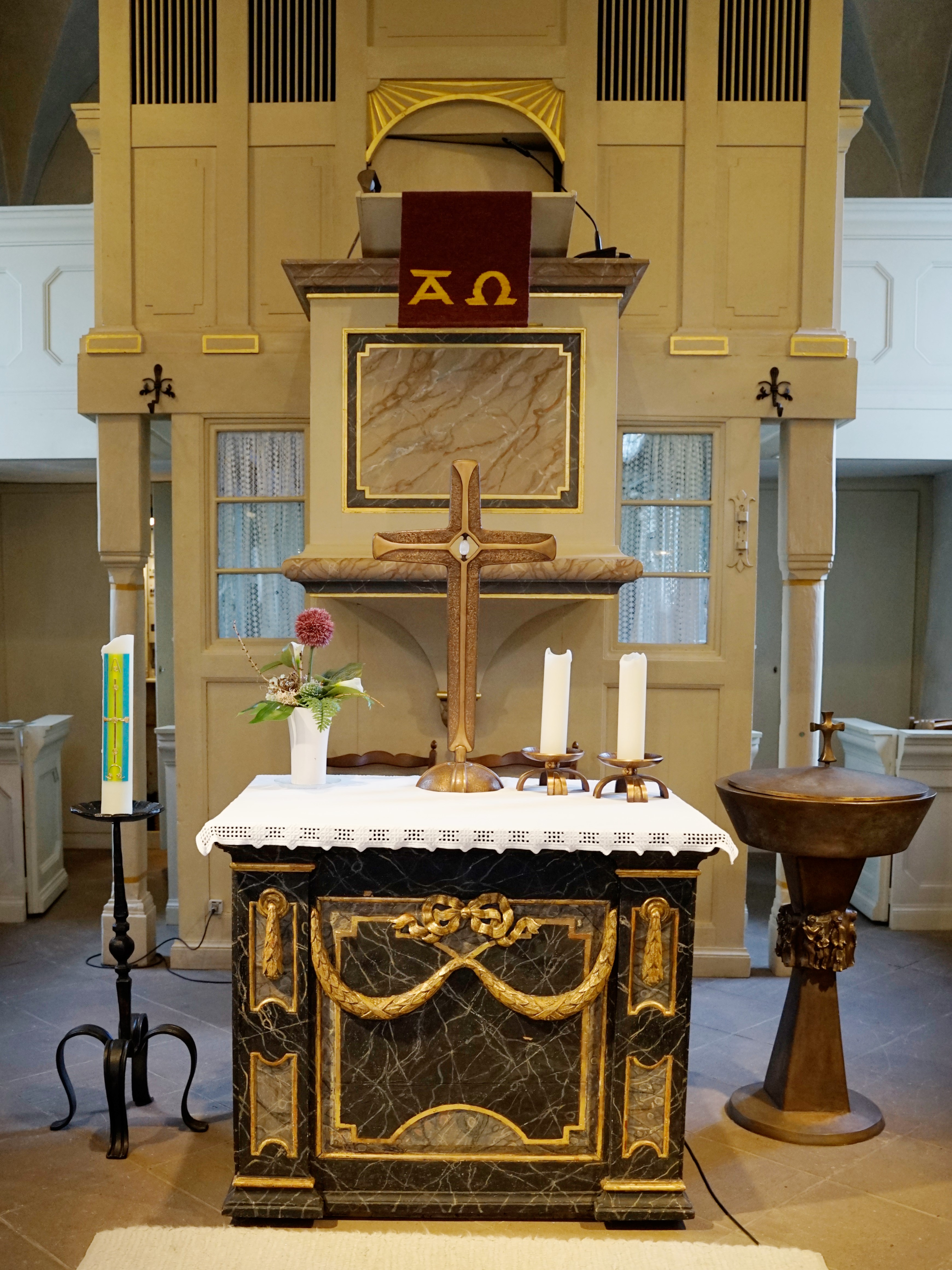 Evangelische Kirche Steindorf, Wetzlar, Lahn-Dill-Kreis, Hessen, Deutschland